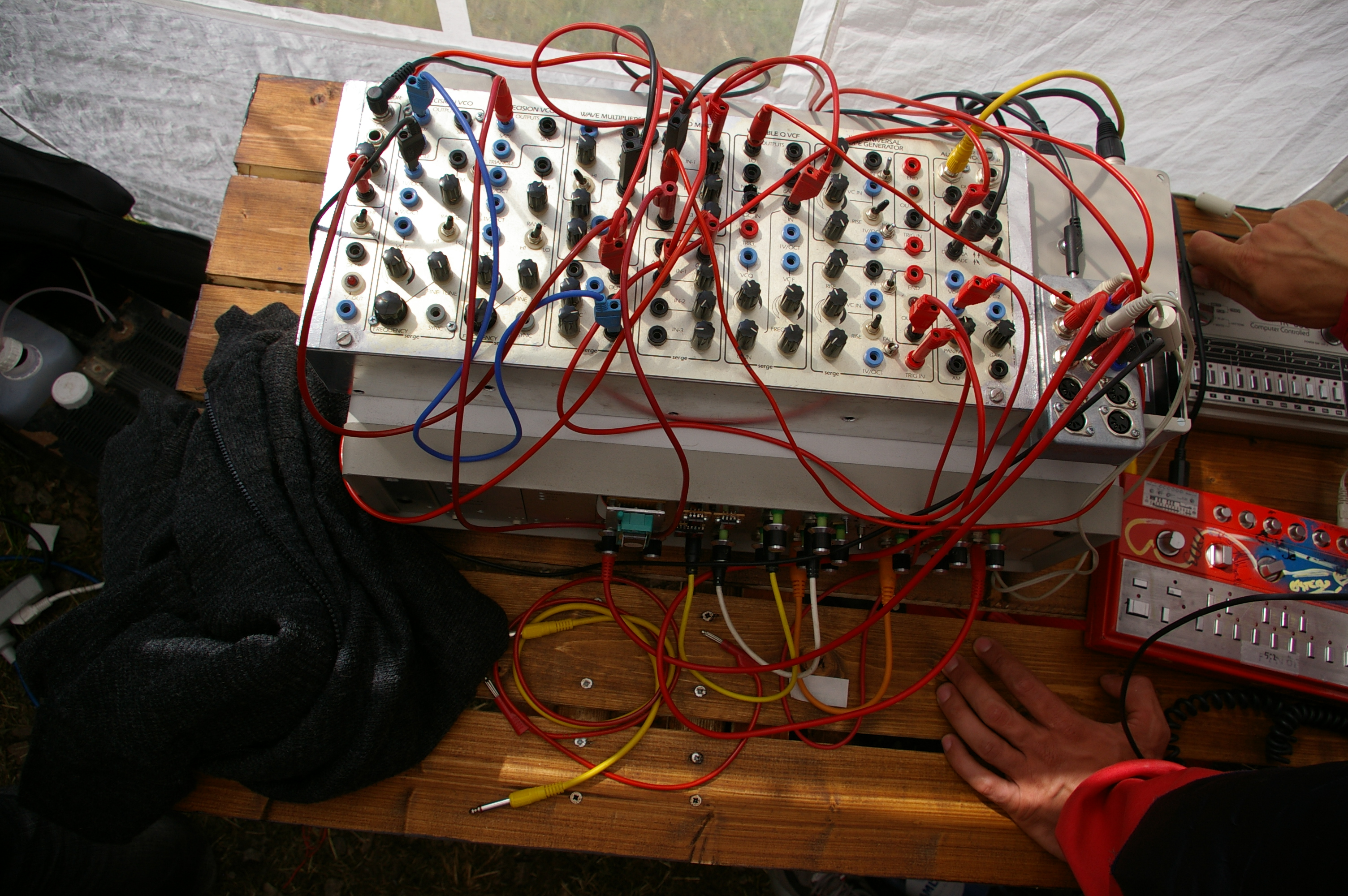 Serge Modular, Norbergfestival 2007